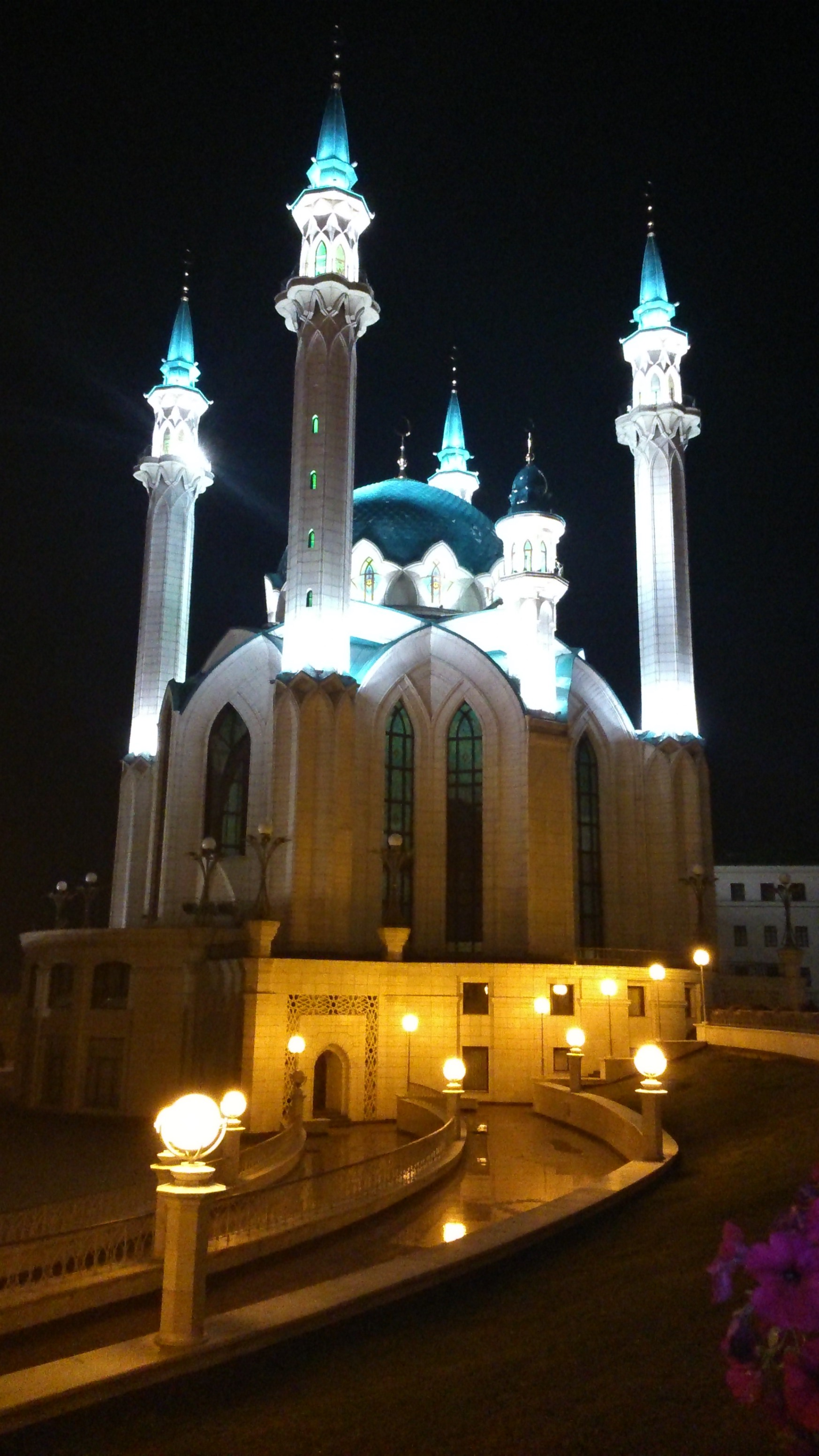 Mešita